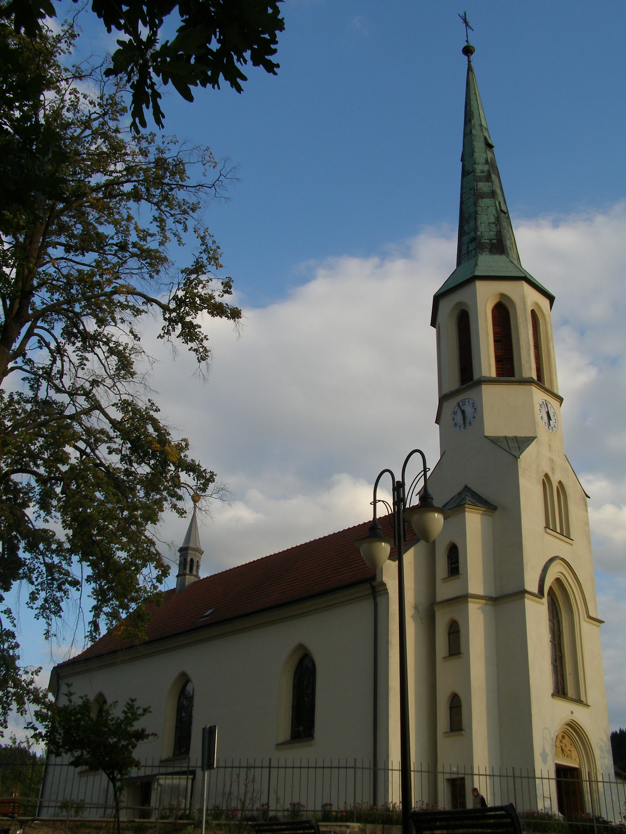 Kostel sv. Maří Magdalény (Hovězí), Hovězí